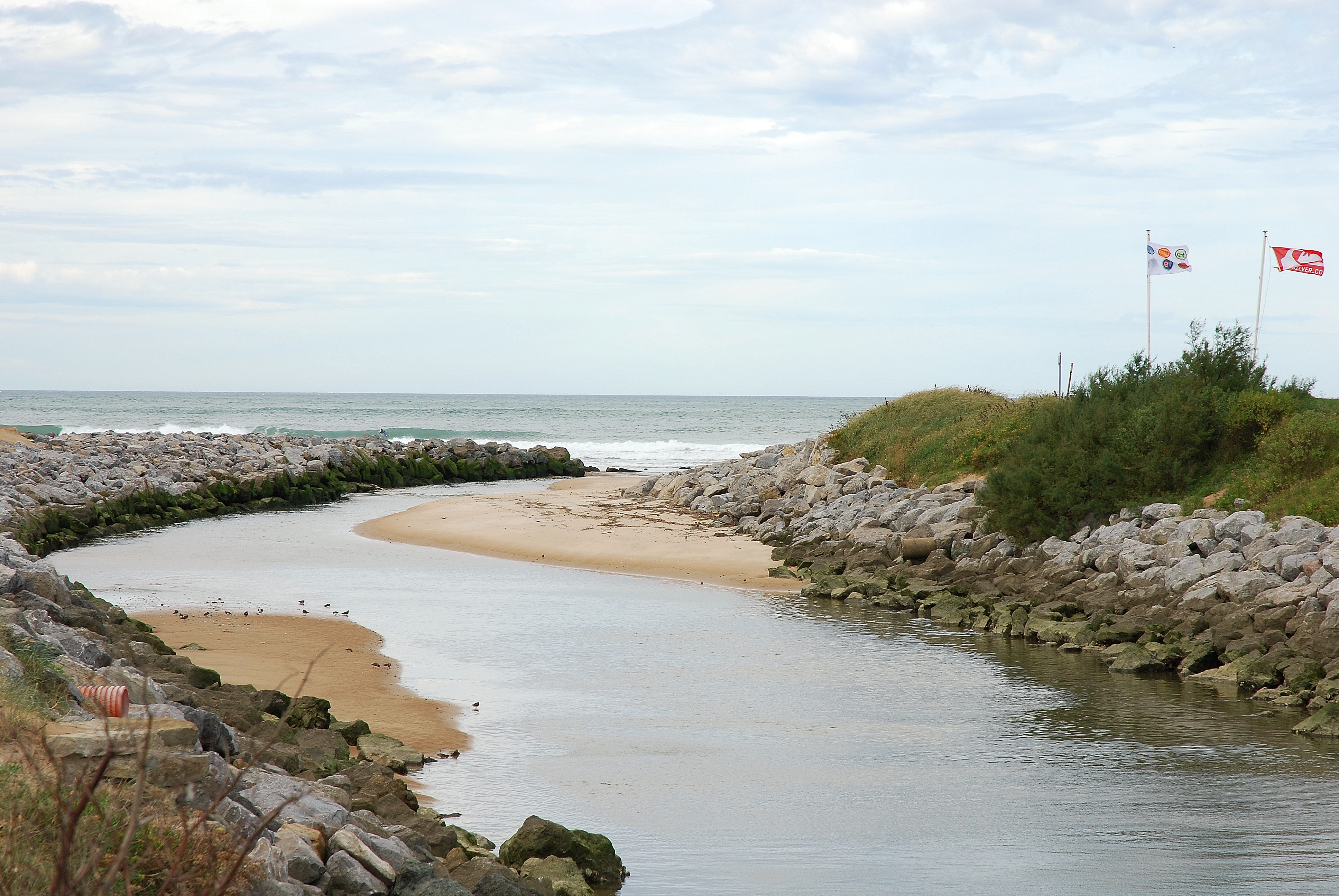 Bidart, l'Uhabia se jette dans l'océan. Photo prise le 20/10/06 par Harrieta171